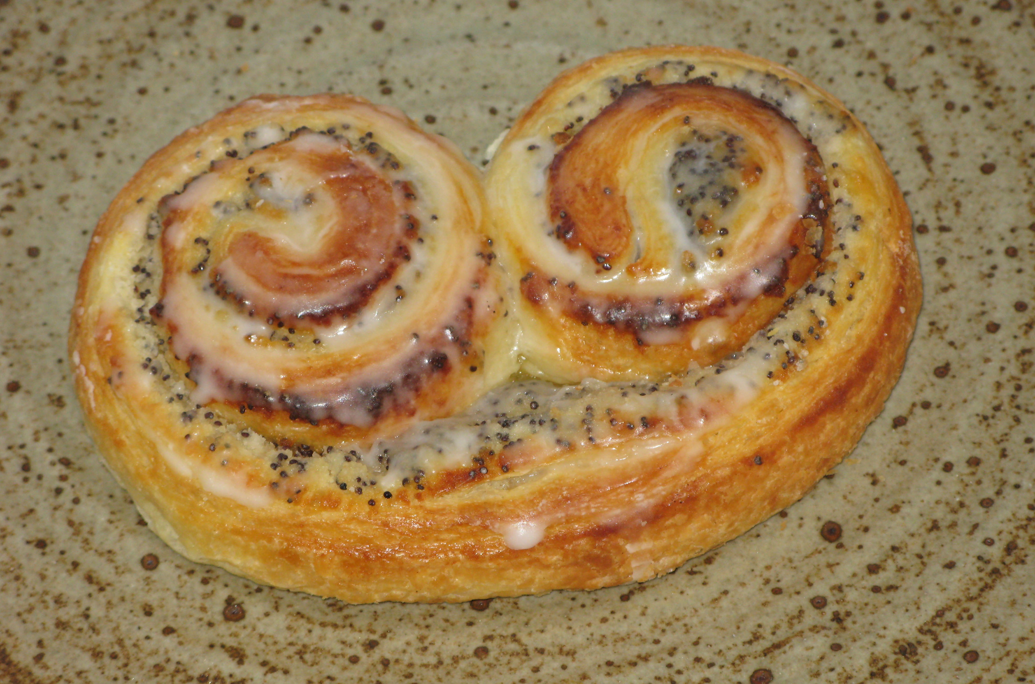 Mohnschneck.